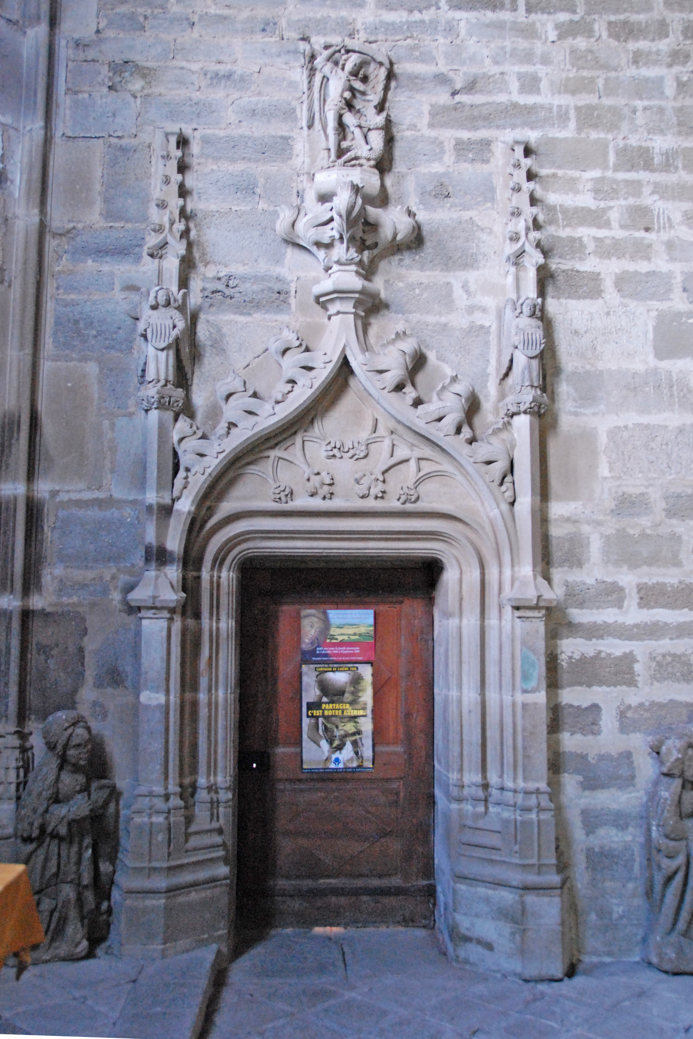 Chanteuges, Chapelle St.-Anne, Südportal